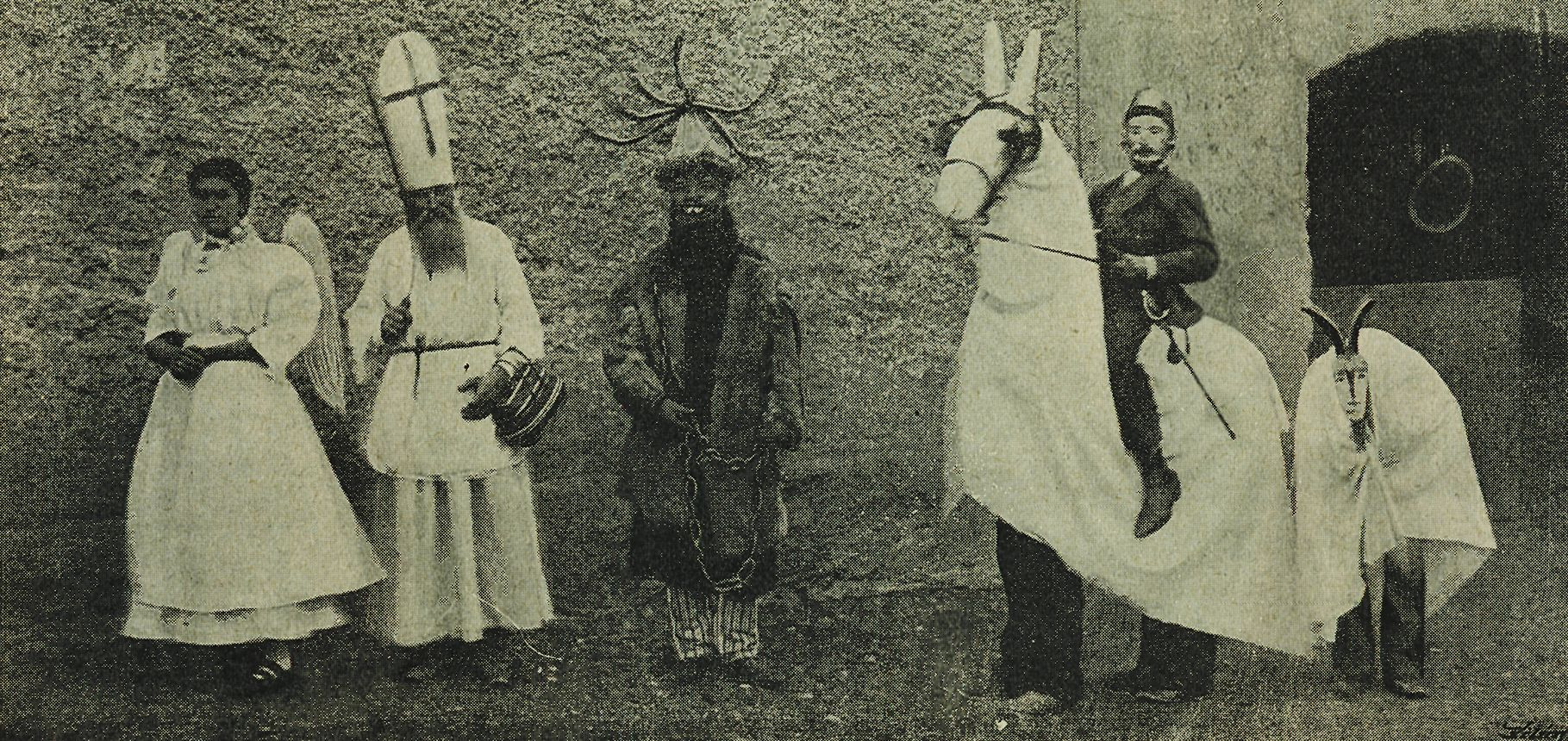 Кобыла и коза в процессии св. Николая